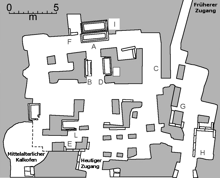 Plan des Scipionengrabes